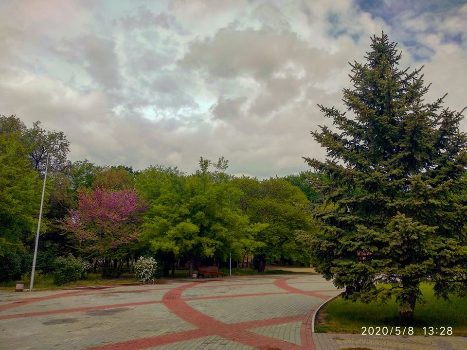 Парк Горького (Мелитополь)